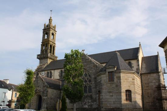 Eglise Edern